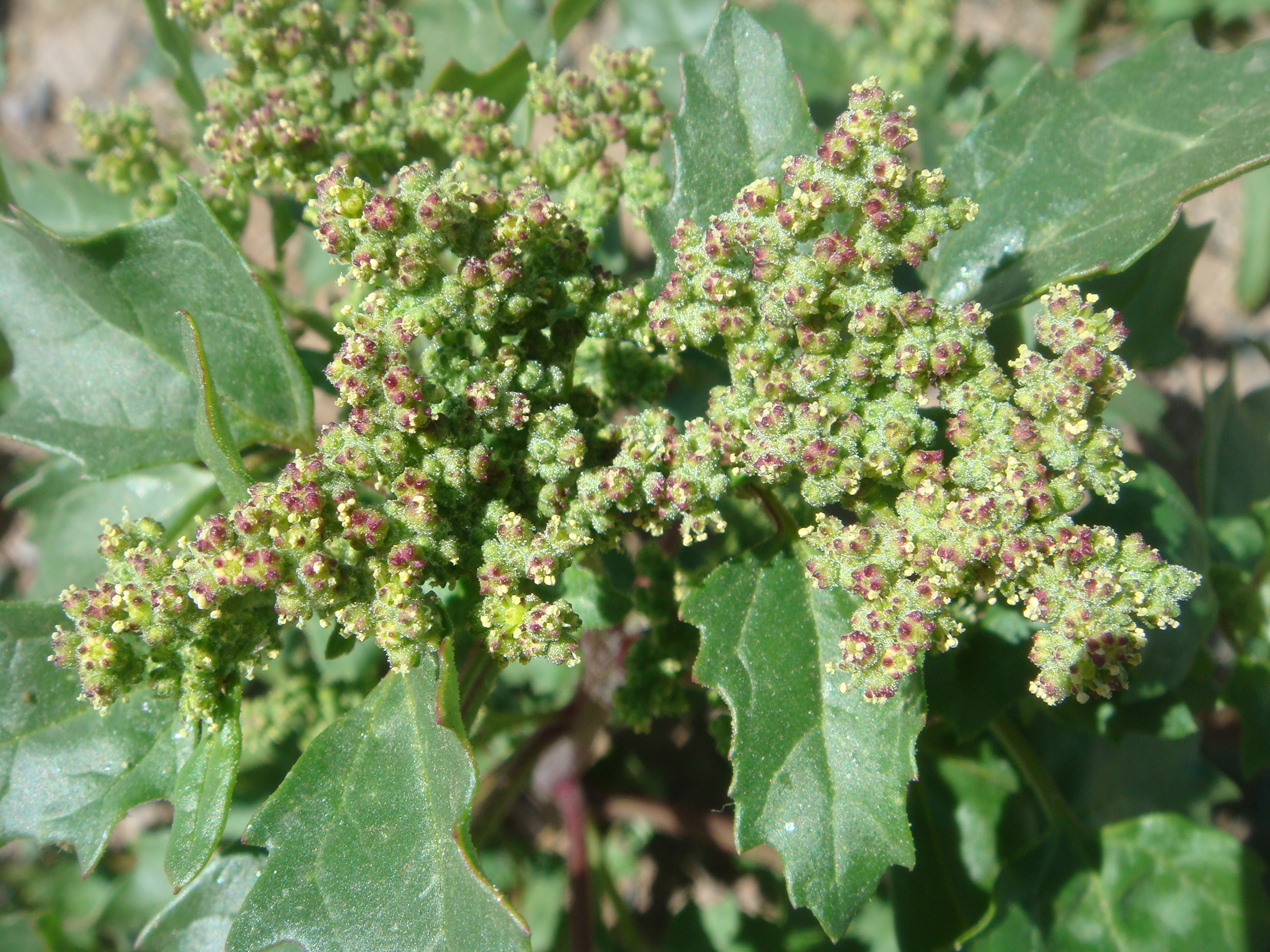 Chenopodium murale, roadside, Tempe, Arizona